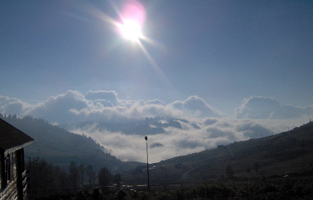 Hıdırnebi yaylası